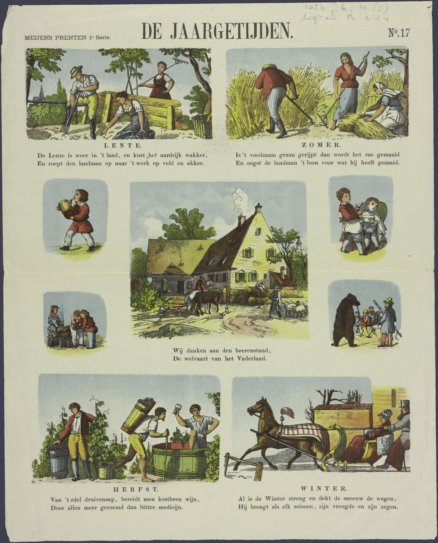 Centsprent met 5 grotere en 4 kleinere in kleur gedrukte litho's, met afbeeldingen van lente (spitten en planten), zomer (maaien), herfst (druiven oogsten), winter (arreslee rijden). In het midden een afb. van een boerderij, en daaromheen afb. van spelende kinderen en een dansende beer. Bevat enkele tweeregelige rijmende onderschriften.